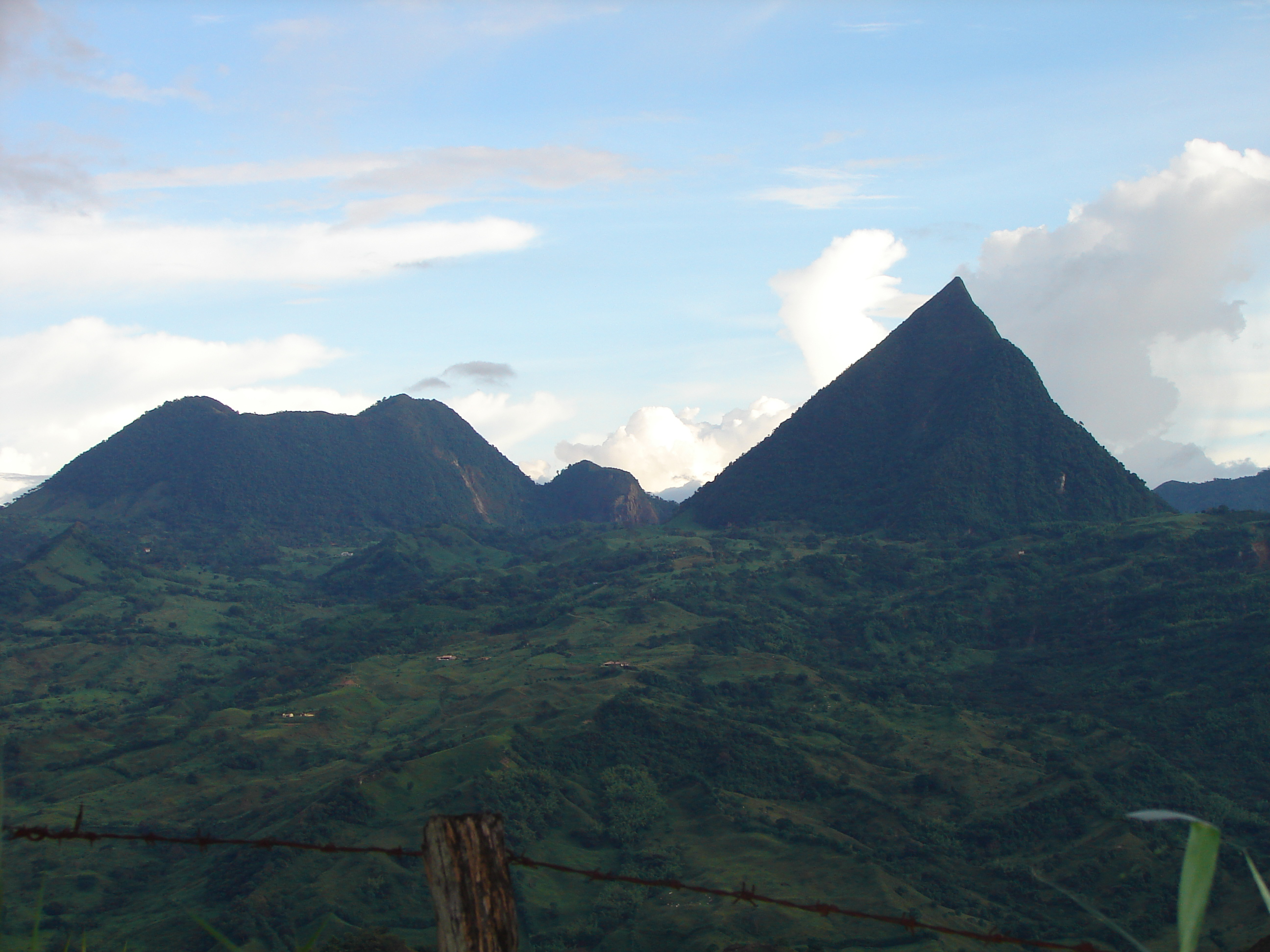 Cerro tusa, localizado en Venecia, Antioquia, Colombia.